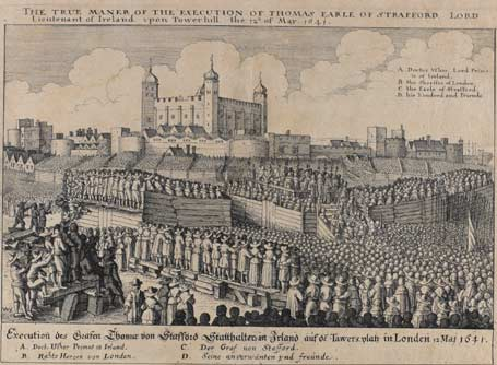 Poprava hraběte zeStraffordu